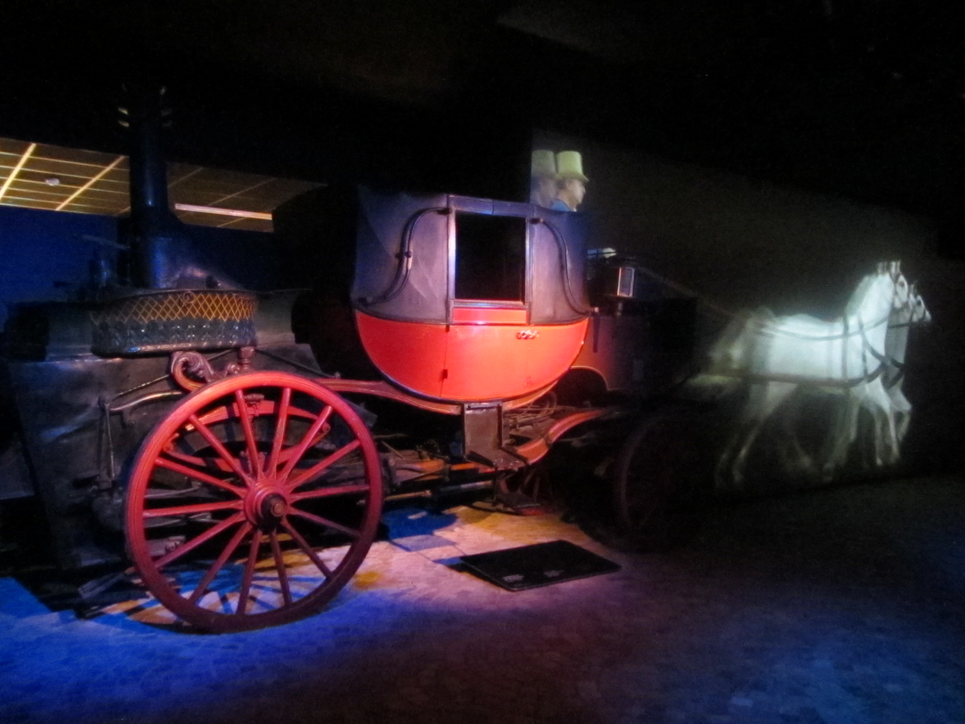 animazione di carrozza storica con cavalli e cocchiere: Torino, Museo Nazionale dell'Automobile